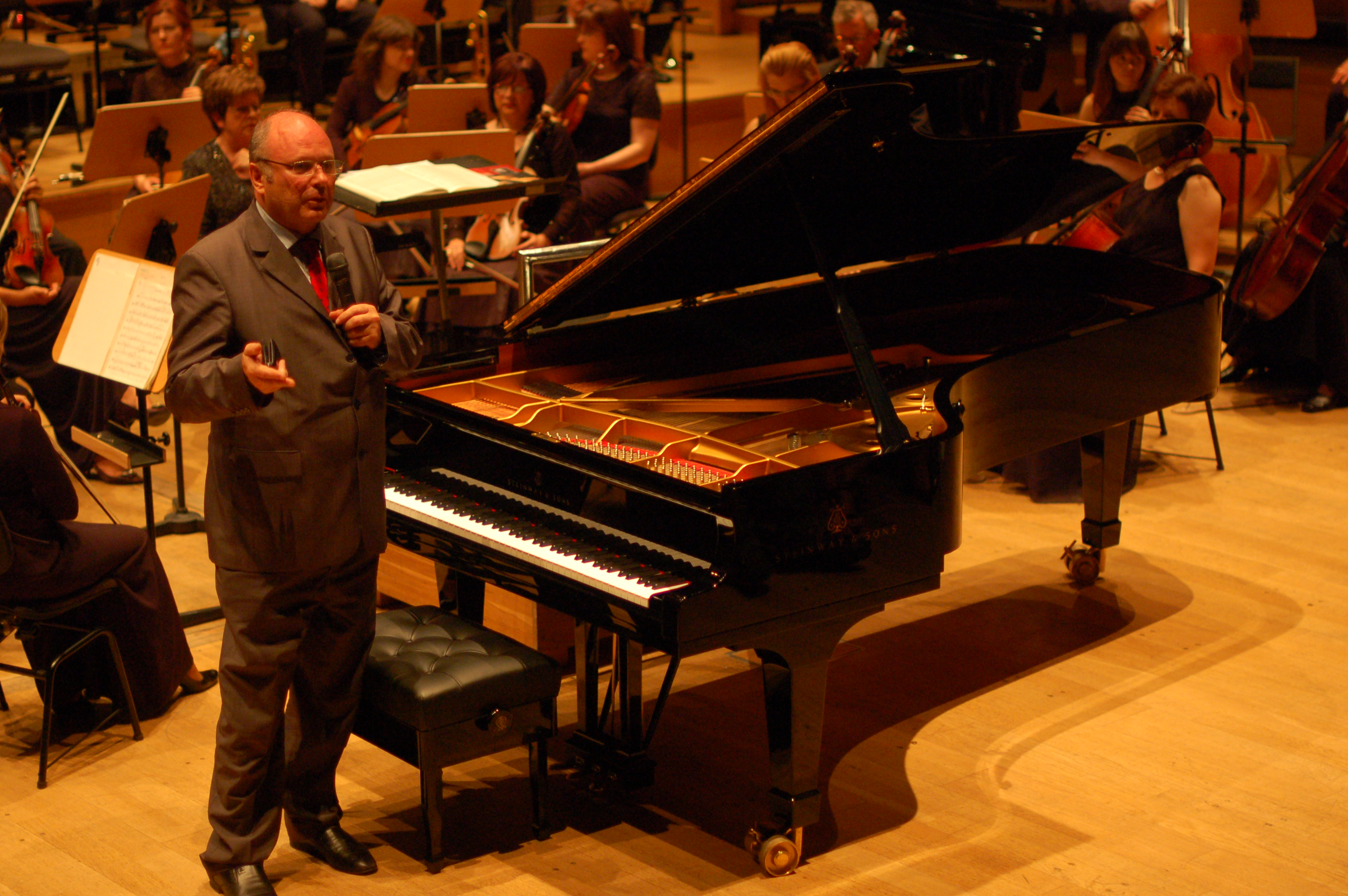 Wikimania Gdansk 2010